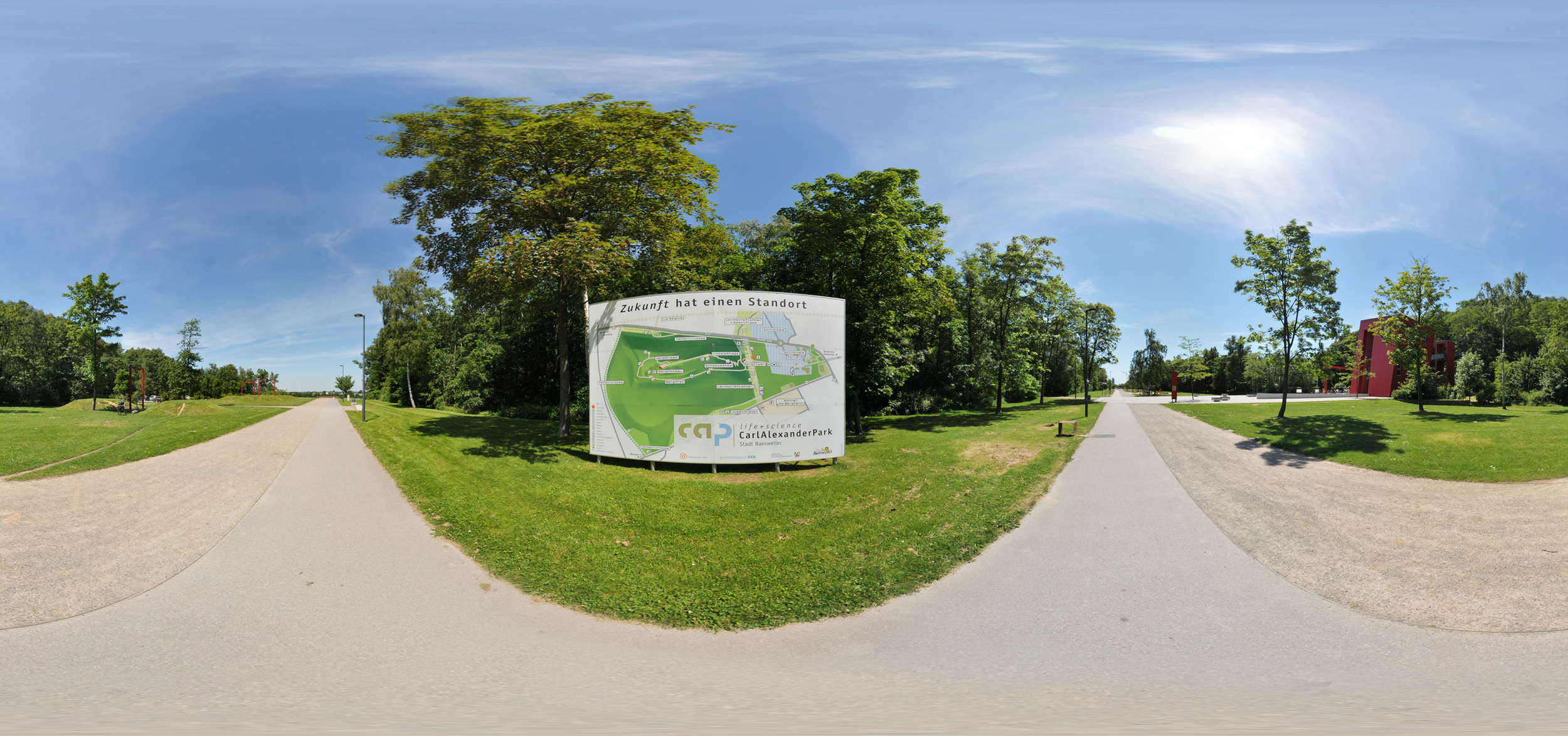 360° Panoramabild des Carl-Alexander-Park in Baesweiler